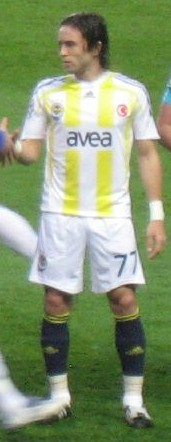 Gökhan Gönül